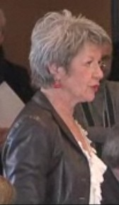 Dominique Gillot au conseil général du Val-d'Oise